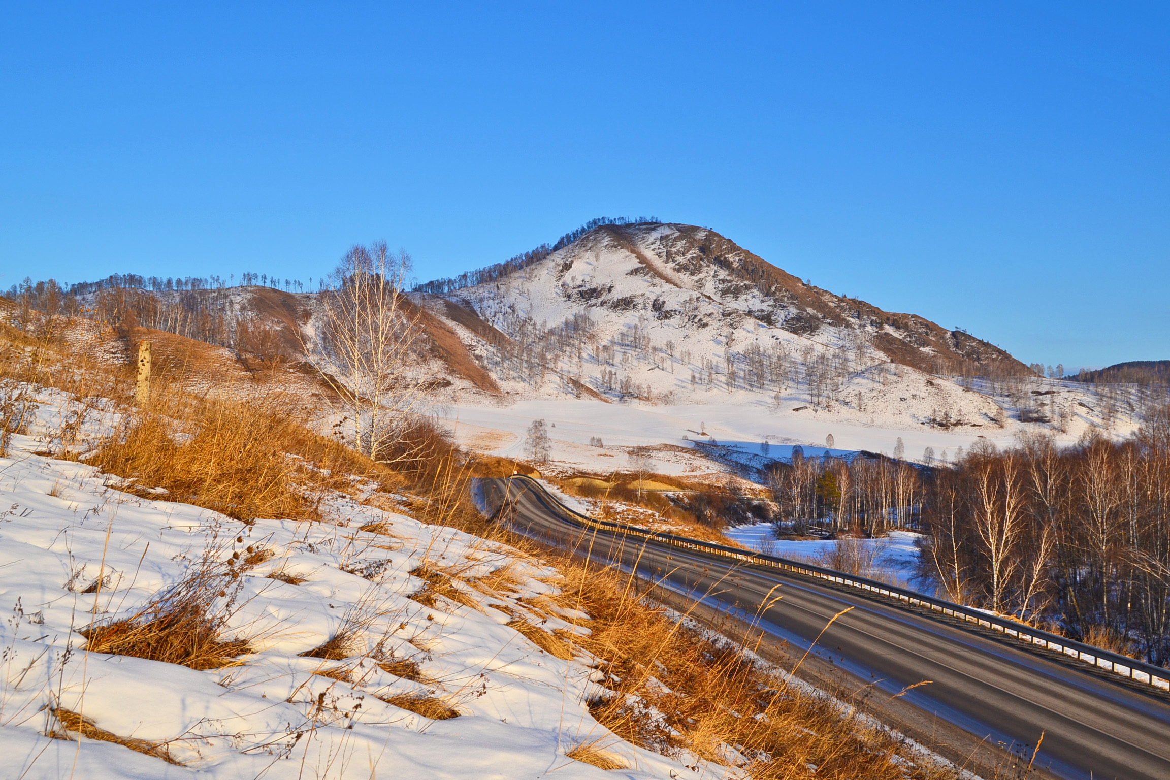 Чуйский тракт в Шебалинском районе, на окраине села Камлак